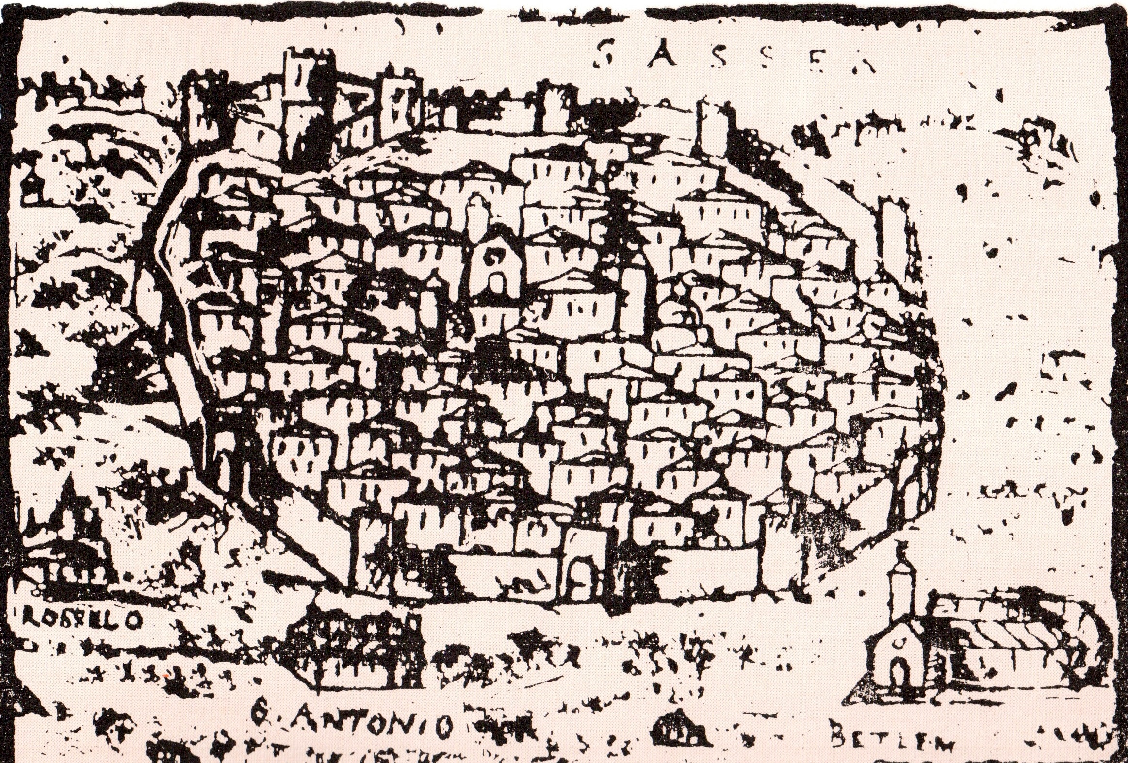 Sassari view in XVI century